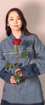 몽골의 연인으로 변신한 안소희와 연우진을 만날 수 있는 단편영화 '아노와호이가' 가 3월 8일 세계 여성의 날 랑콤 유투브 채널에서 공개됩니다. 마리끌레르 4월호 화보에서도 만날 수 있으니 기대해주세요!